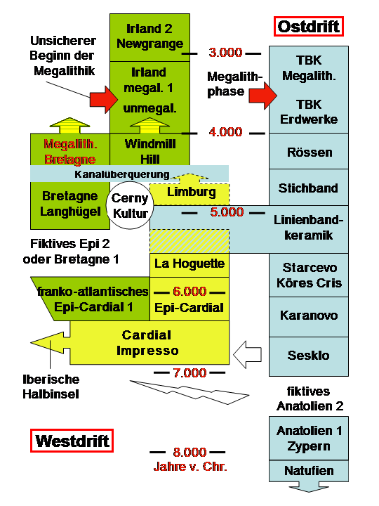 Verbreitungswege vorausgehender und nachfolgender Kulturen